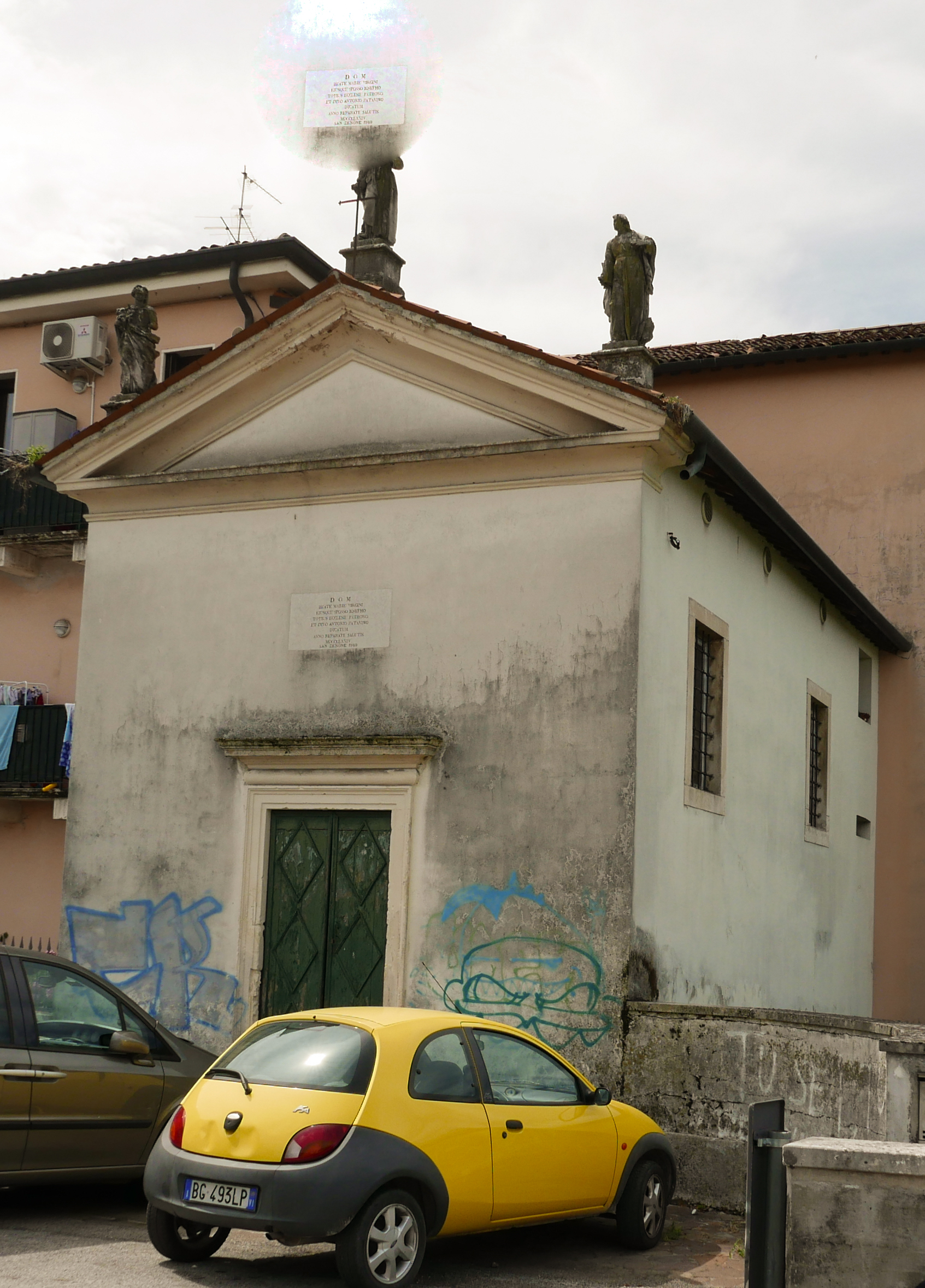 Oratorio San Giuseppe, nel quartiere San Pio X a Vicenza